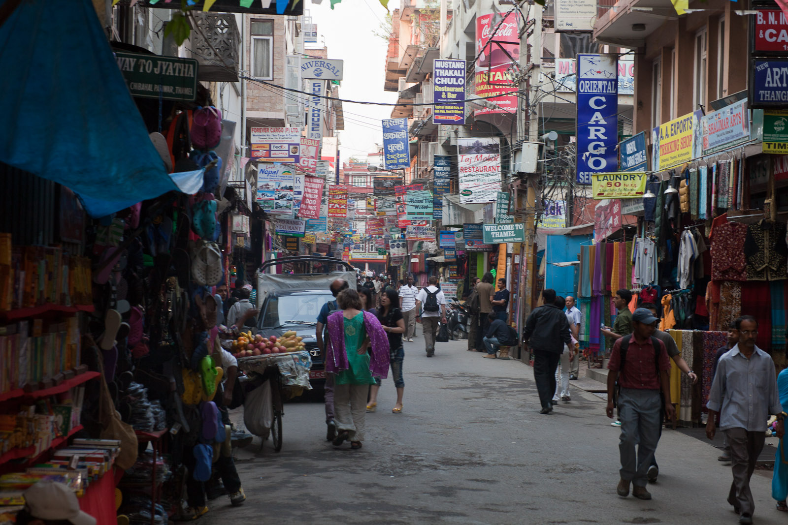 Kathmandu